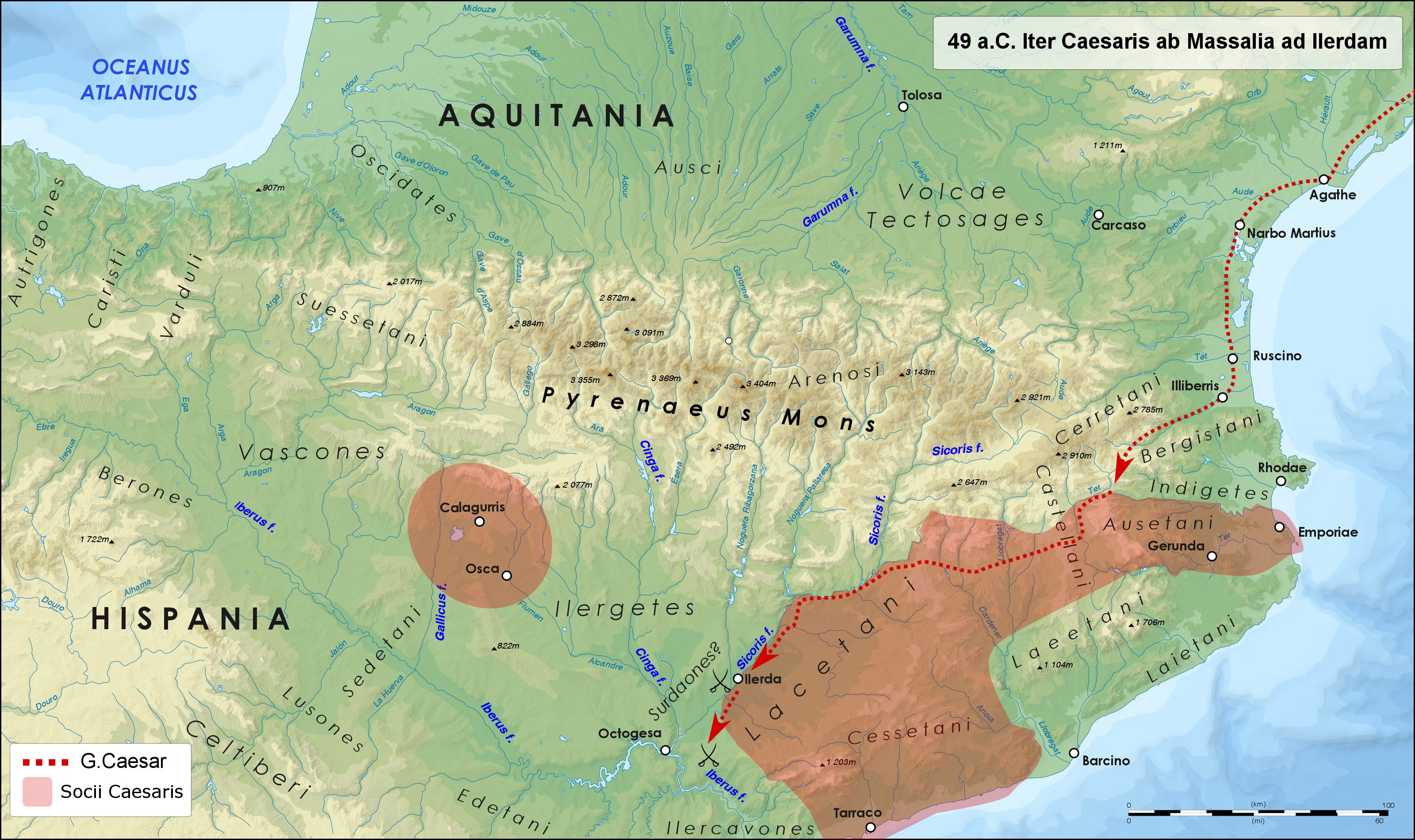 La marcia di Cesare in Spagna nel 49 a.C. e la campagna di Ilerda dove riuscì a sconfiggere i legati di Pompeo, Afranio e Petreio